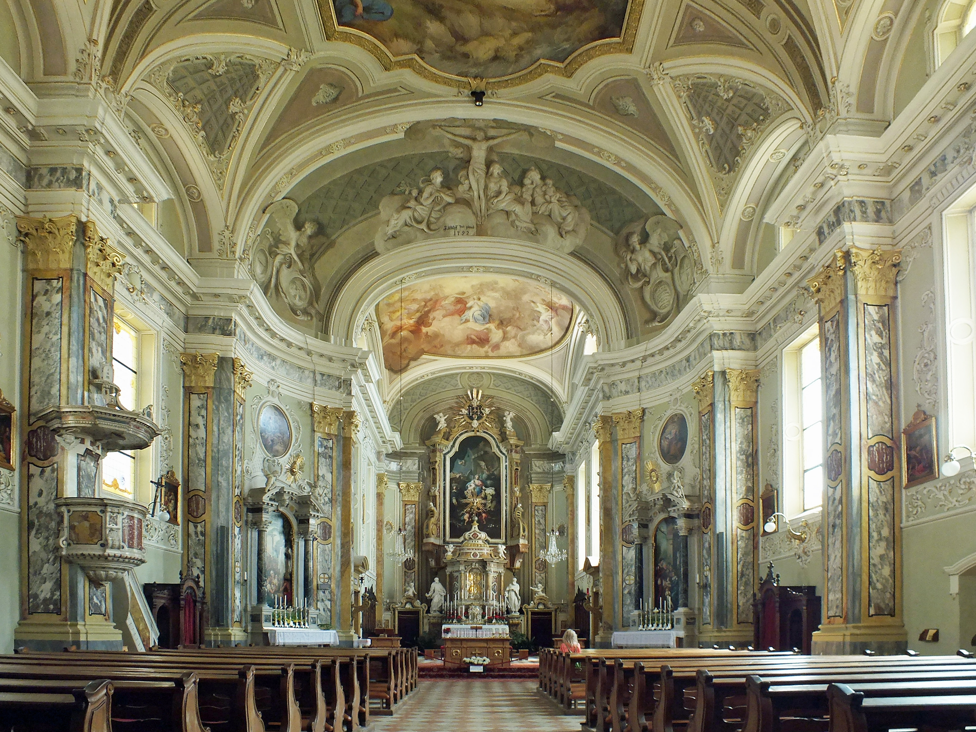 Das Innere der Pfarrkirche Maria Himmelfahrt in Kaltern